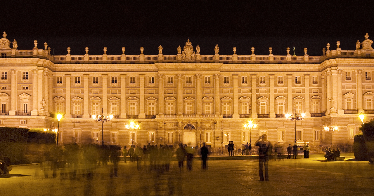 Palacio Real de Madrid. Vista nocturna. 2008.